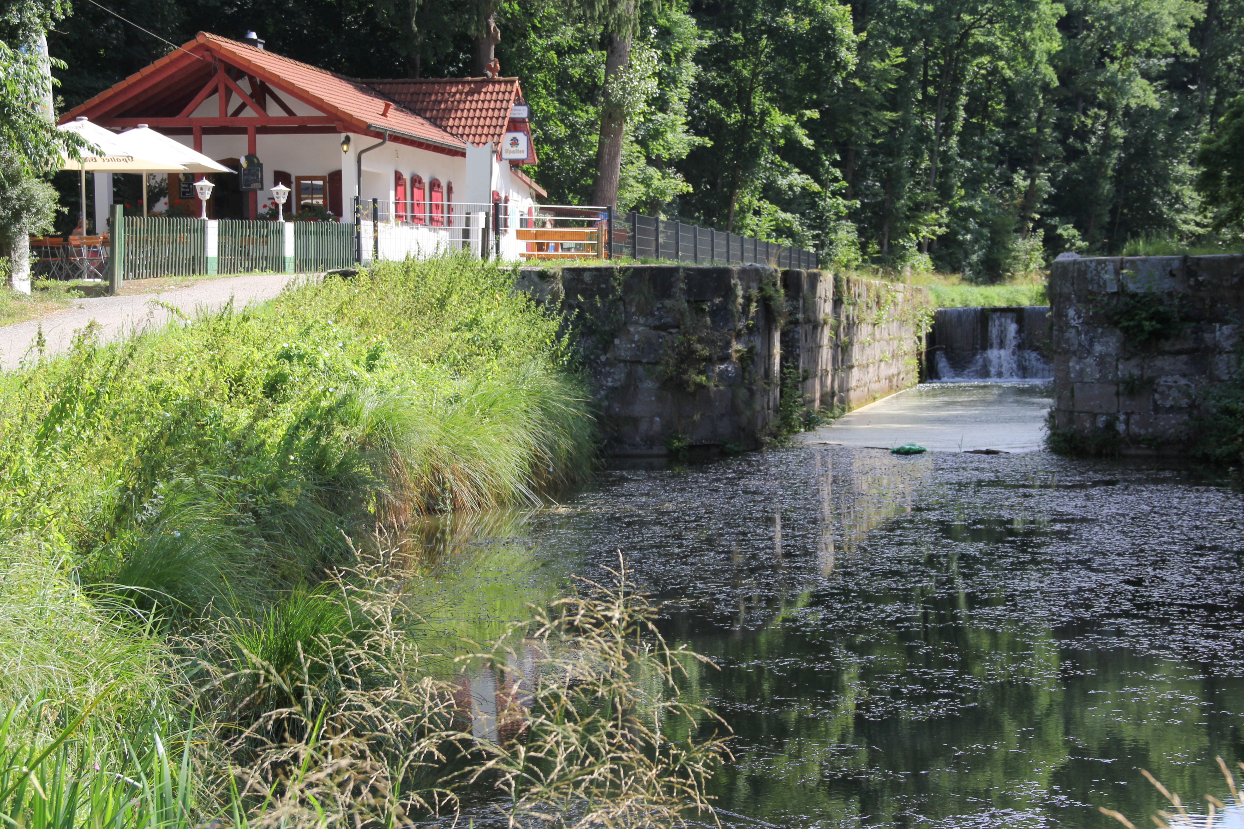 Schleuse 35